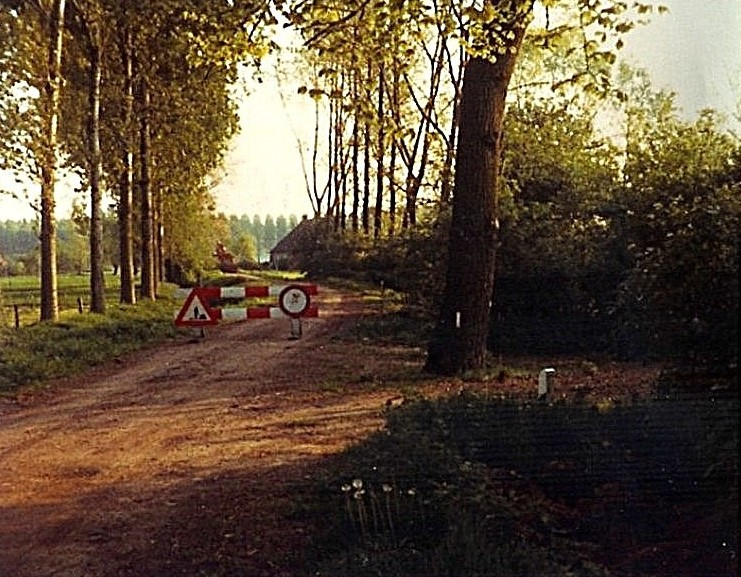 Een van de takken van de Beemdkant wordt afgesloten.